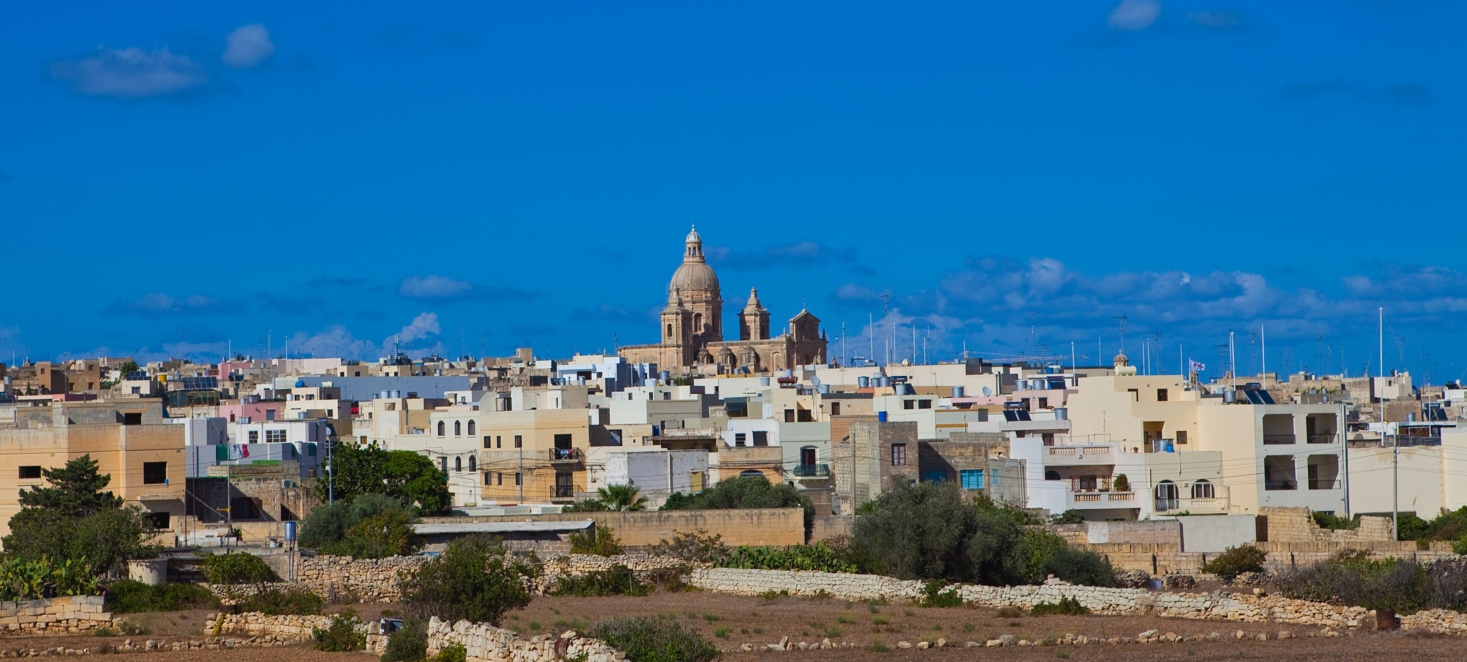 Malta 2010